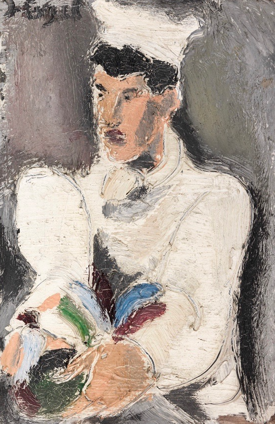 Öl auf Leinwand, Gemälde